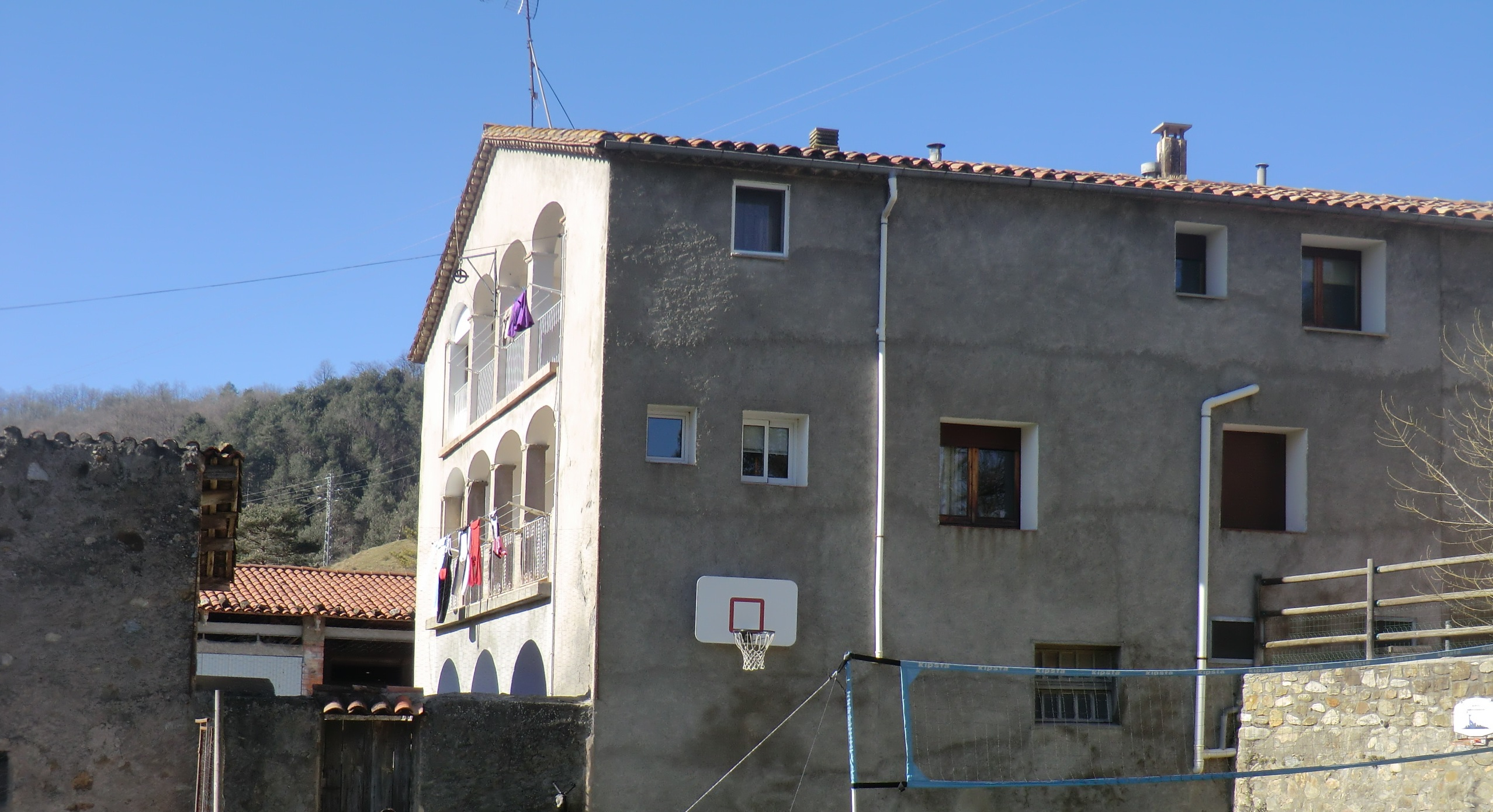 Masia la Batllia, a Sant Joan de les Abadeses